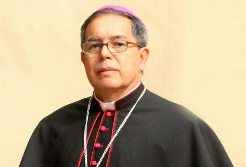 Obispo católico colombiano